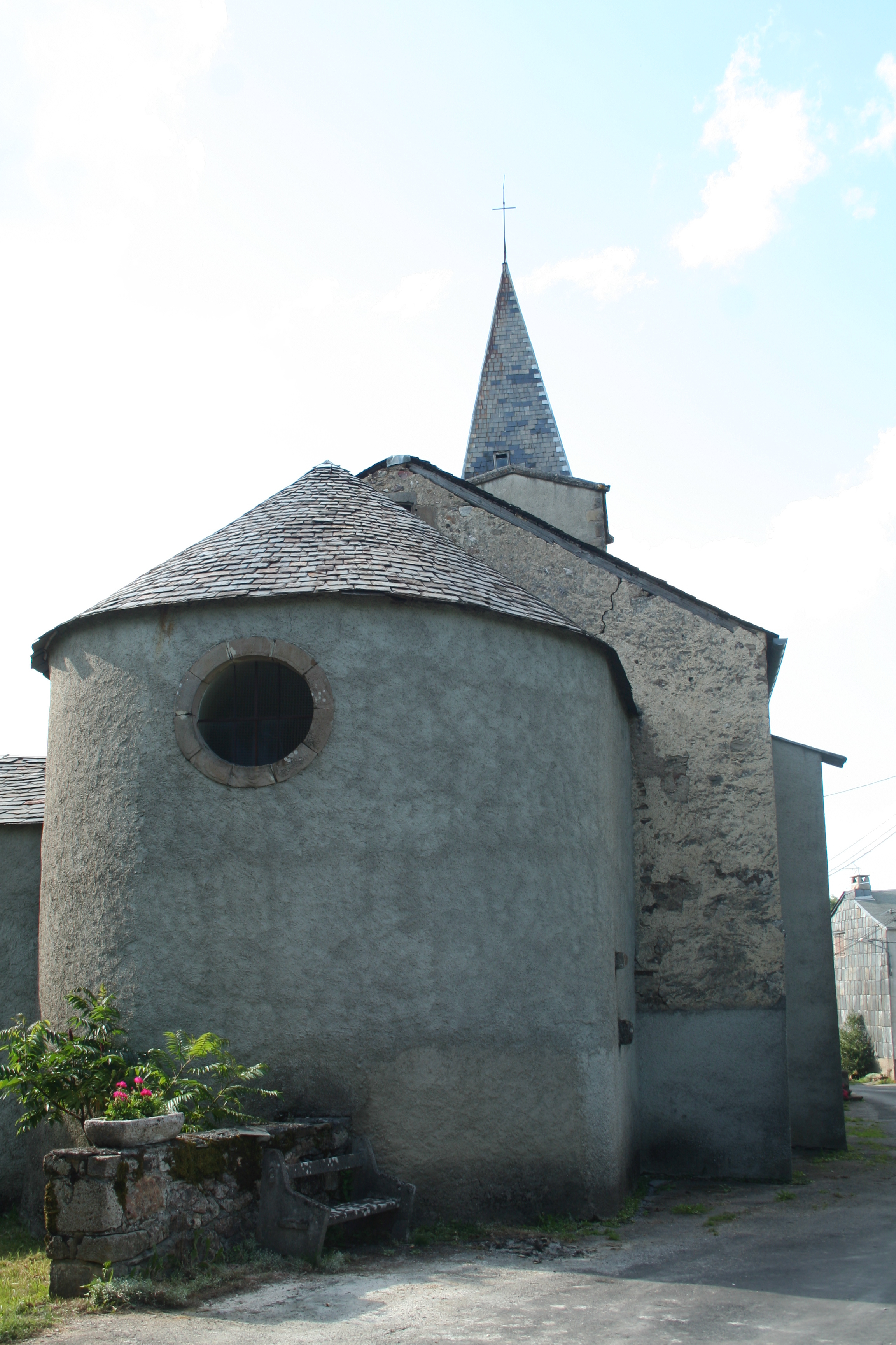 Laval-Roquecezière (Aveyron) - église Saint-Jacques - chevet